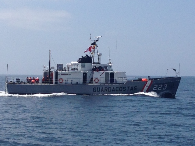 PM-223 durante las pruebas de navegación Diciembre 2013.